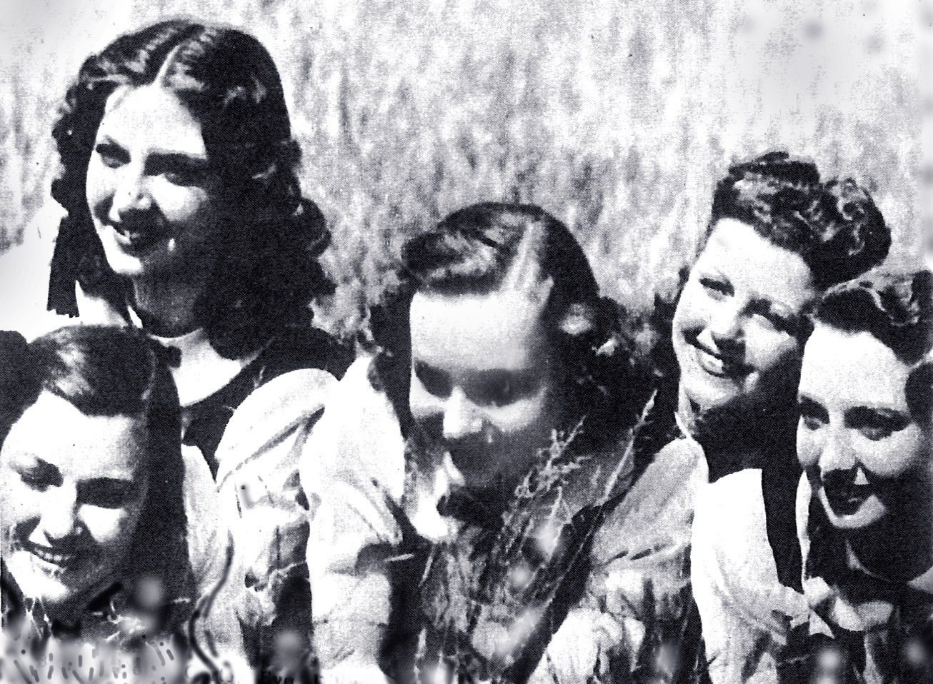 Giuliana Pitti, Diana Franci, Irasema Dilian, Tatiana Farnese e Bianca Della Corte in "ore 9 lezione di chimica" (Mattoli, 1941)